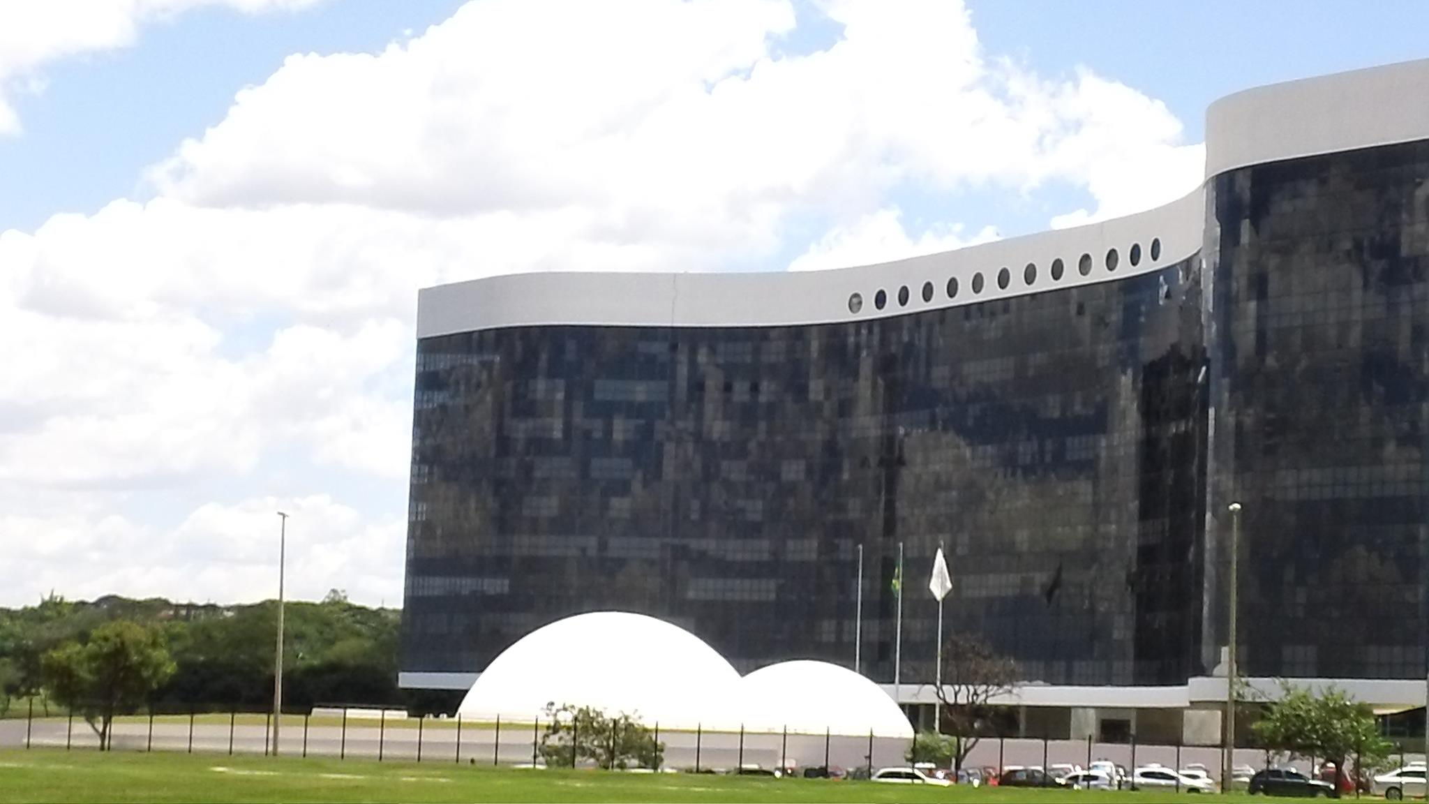 Edifício-sede do Tribunal Superior Eleitoral, em Brasília, inaugurado em dezembro de 2011.